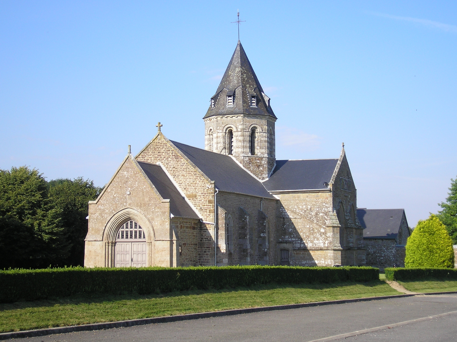 L'église de Sainte-Marie-Laumont (France, Normandie).